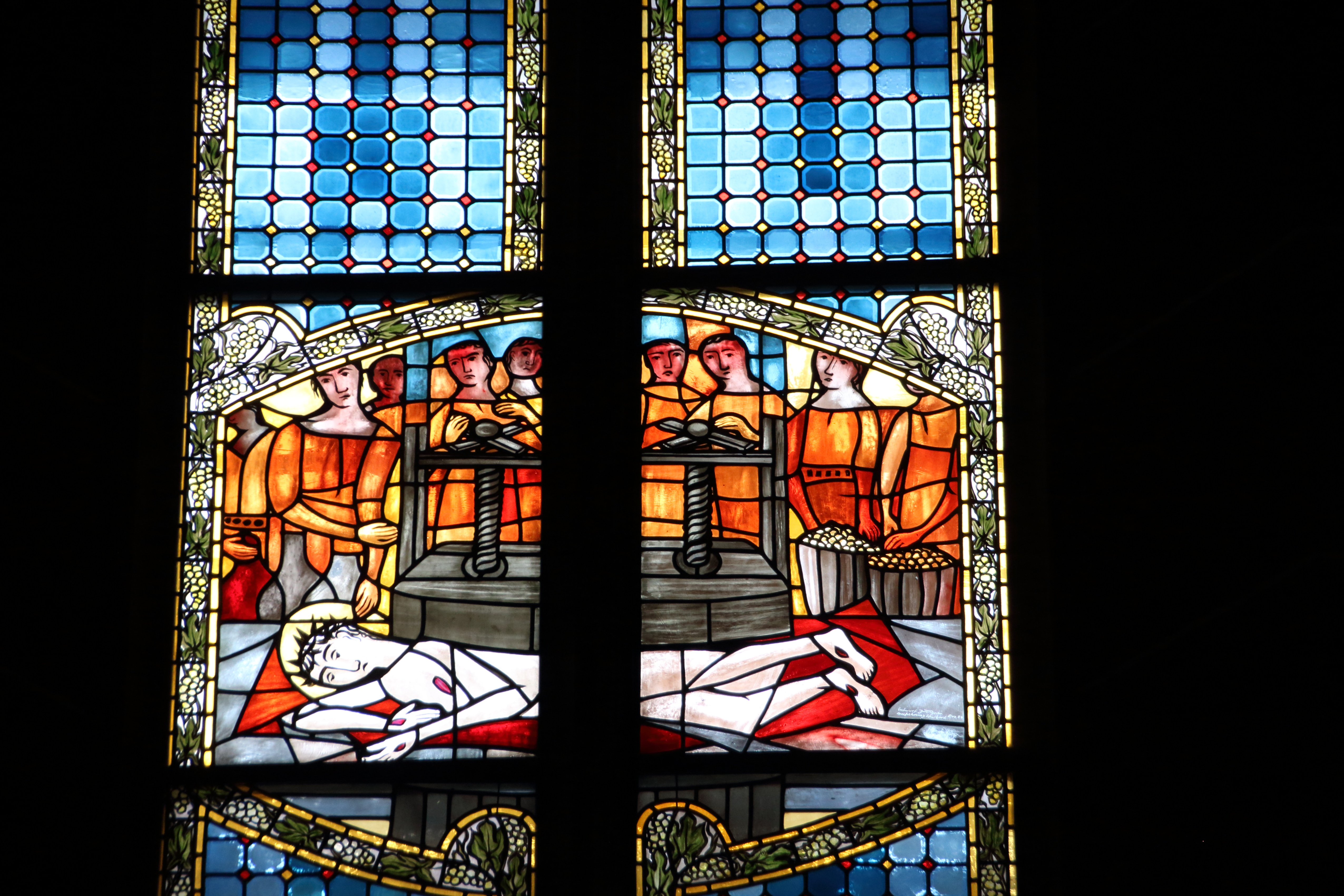 Glasfenster "Christus in der Kelter" des Künstlers Jupp Jost, eingebaut 1984. Mittelfenster der von Jost geschaffenen drei Fenster zum Thema "Der Wein im Alten und Neuen Testament". St. Peter und Paul, Eltville am Rhein.